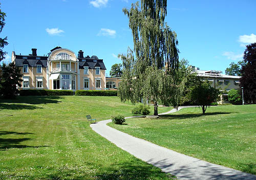 En bild på Blomsterfondens anläggning Svalnäs.